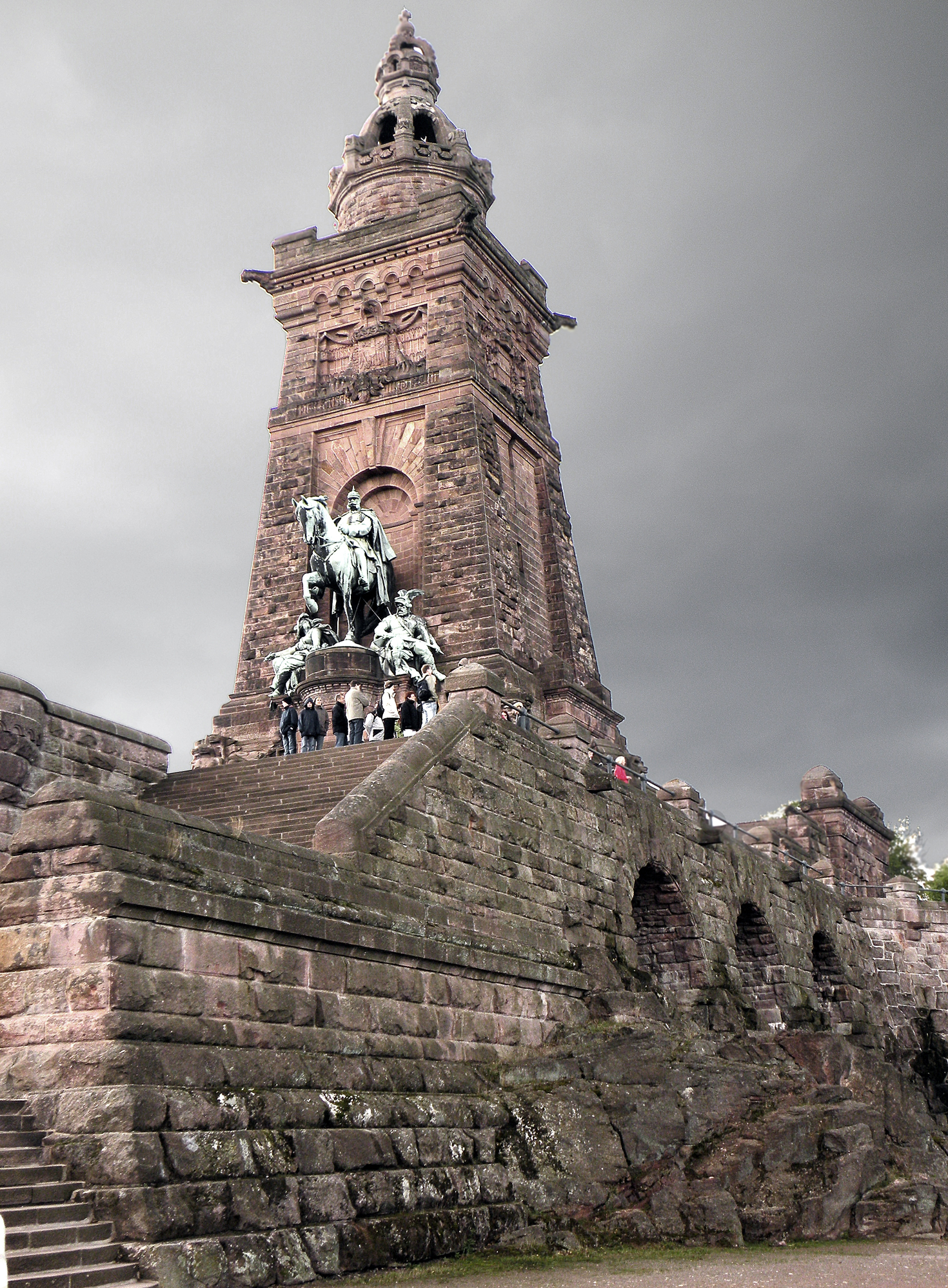 Башня Барбароссы. Кифхаузен